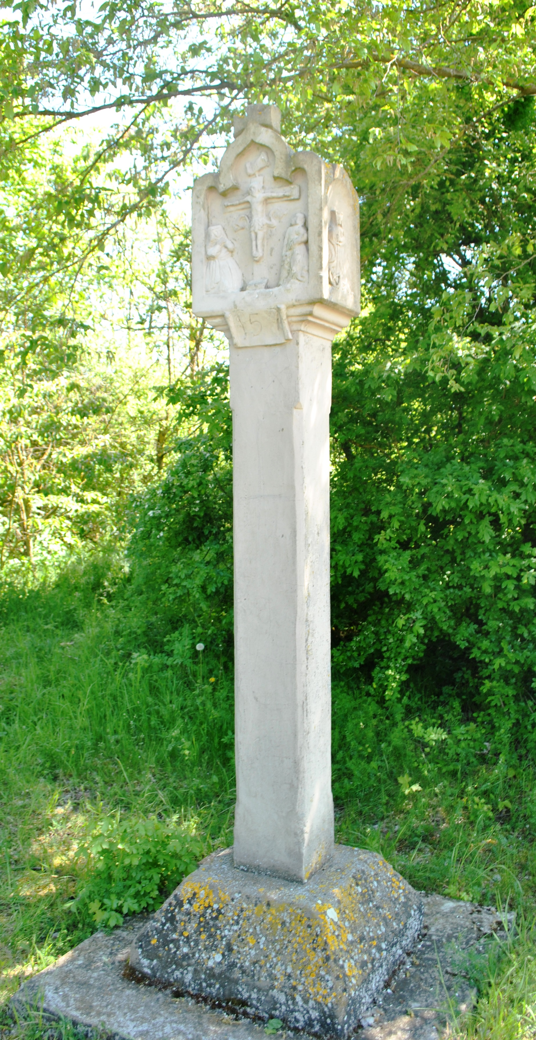 Bildstock mit Kreuzigung und Seitenfigur, Sandstein, bezeichnet 1579 D-6-75-174-268